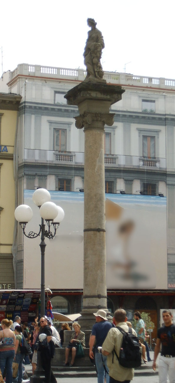 Colonna dell'Abbondanza, in Piazza della Repubblica, Florence, Italy